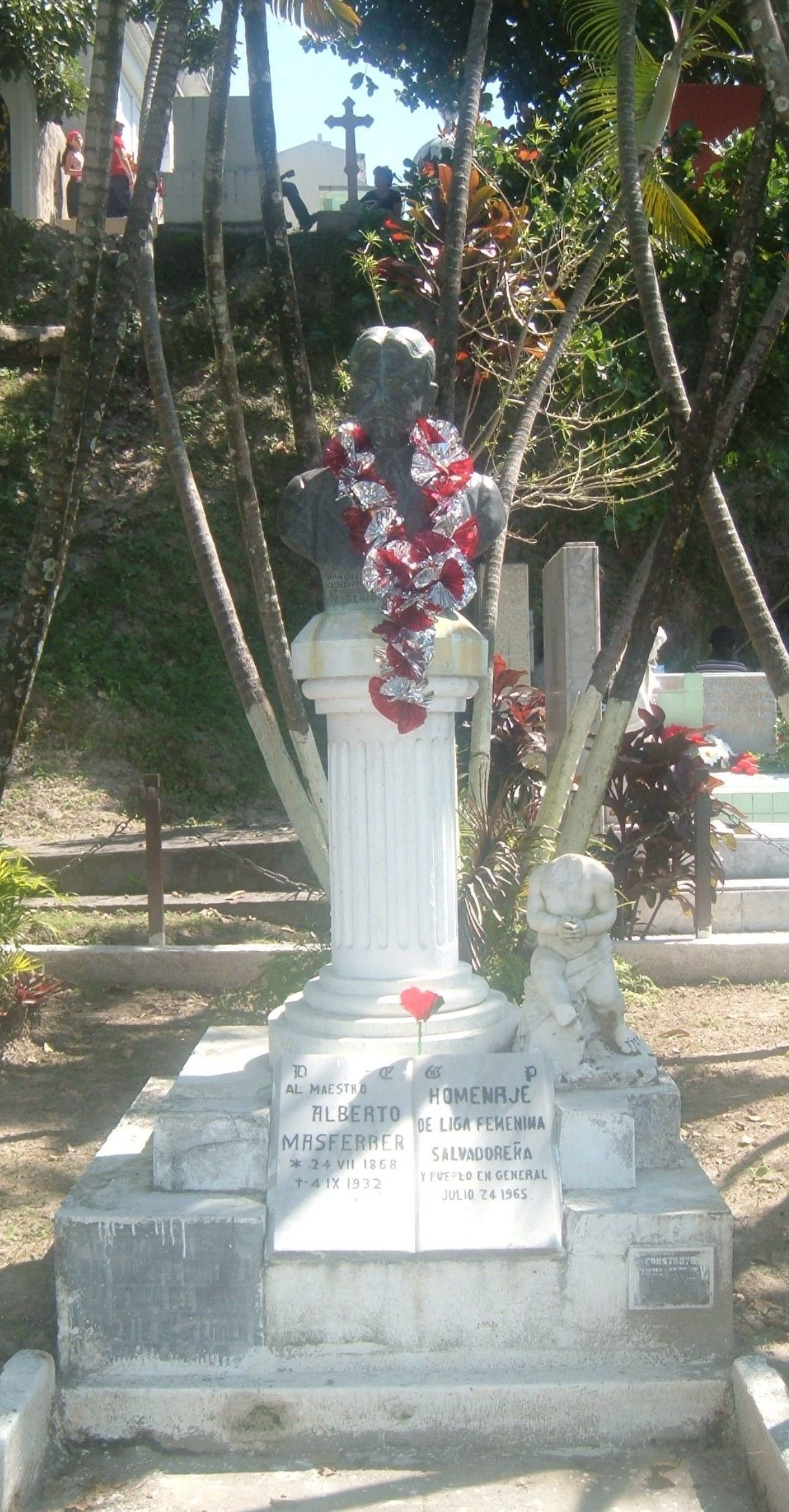 Alberto Masferrer´s tomb (salvadorean writer) in San Salvador,El Salvador.